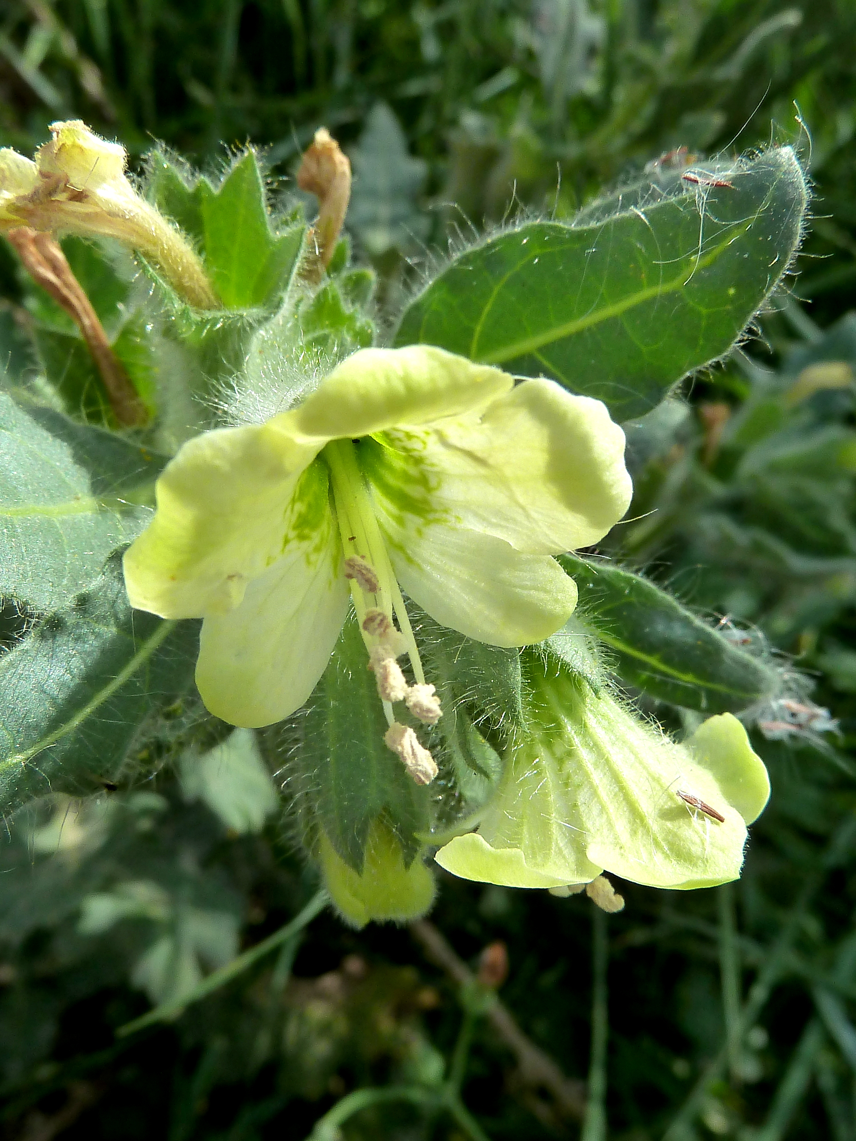 Hyoscyamus albus (Beleño) : Flores - La Huerta, Albatera (Provincia de Alicante, España).